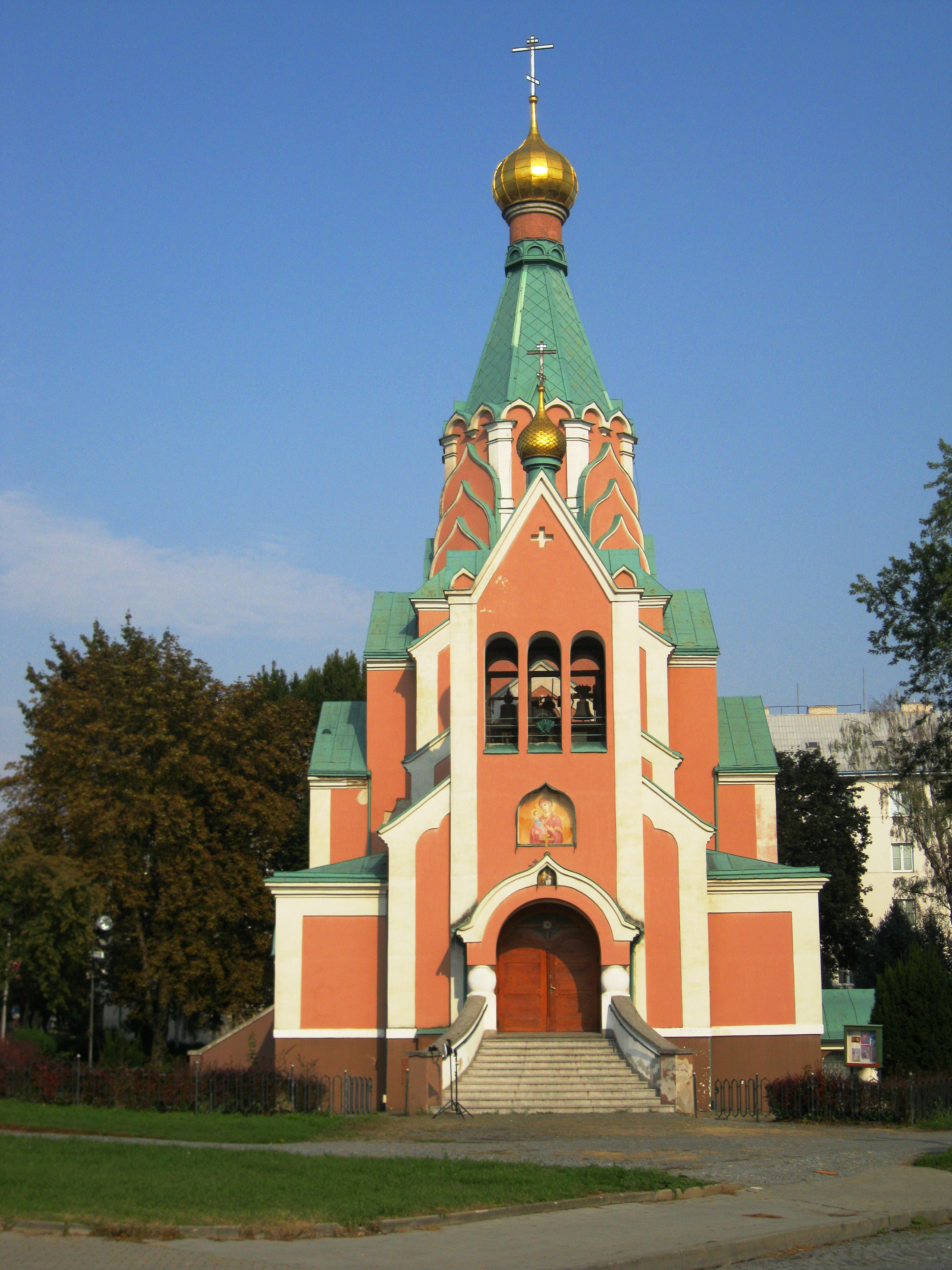 Kostel sv. Gorazda (Olomouc)